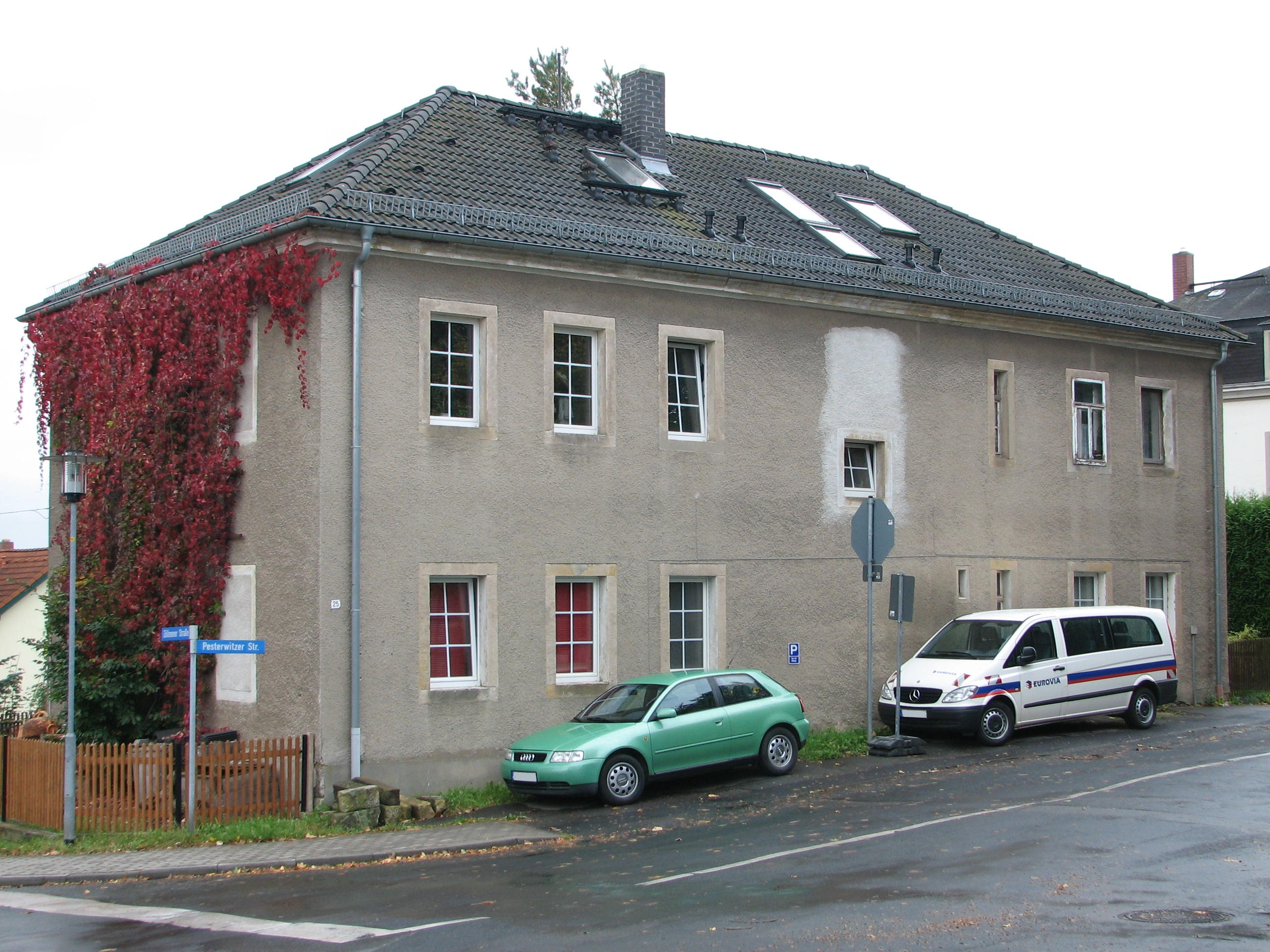 Erstes Wurgwitzer Schulgebäude, heute Wohnhaus